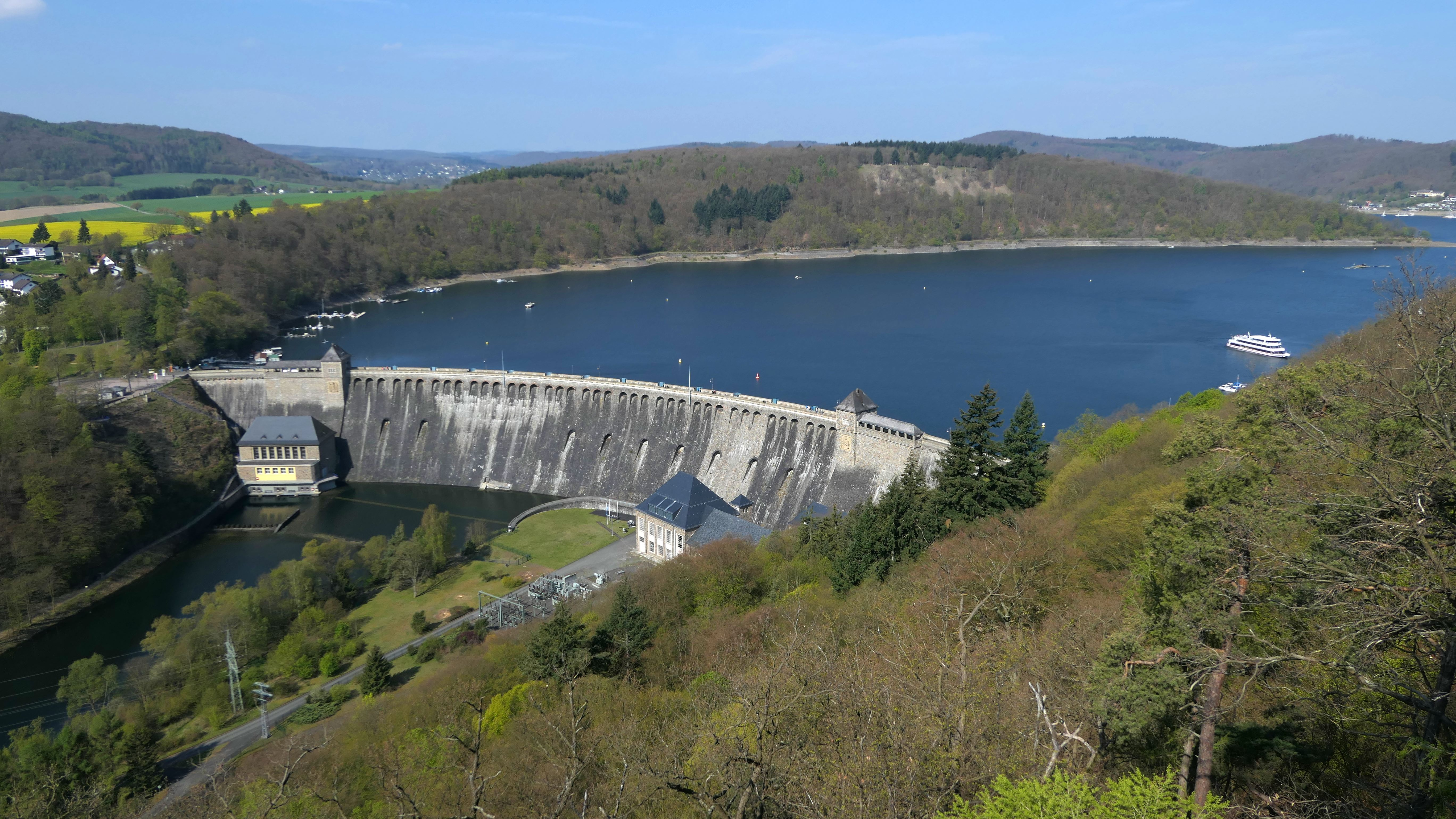 Edertalsperre in Hessen (Deutschland) vom Uhrenkopf aus gesehen